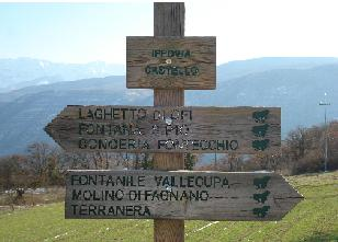 Indicazioni dell'Ippovia poste lungo gli itinerari della Valle.